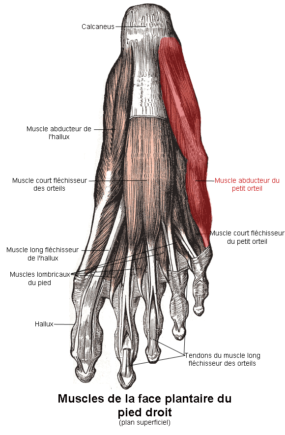 Muscle abducteur petit orteil